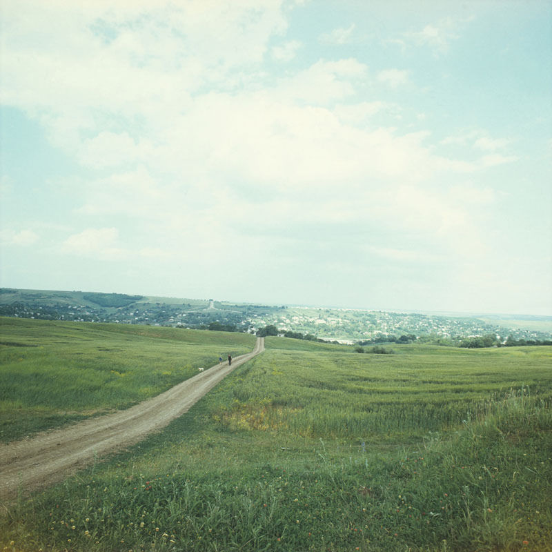 Hiliuți village of Rîșcani District (Moldova) in 1980